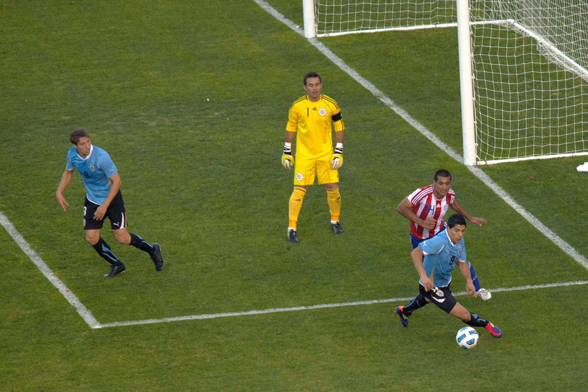 Secuencia en la que Justo Villar, guardameta paraguayo elegido mejor arquero de la Copa América 2011, desvía una pelota que se le hubiera metido en su arco, durante el partido final del torneo, entre Uruguay y Paraguay. Intervienen también en la jugada su compatriota Paulo Da Silva y los uruguayos Sebastián Eguren y Luis Suárez. Estadio Monumental Antonio Vespucio Liberti, Buenos Aires, Argentina.